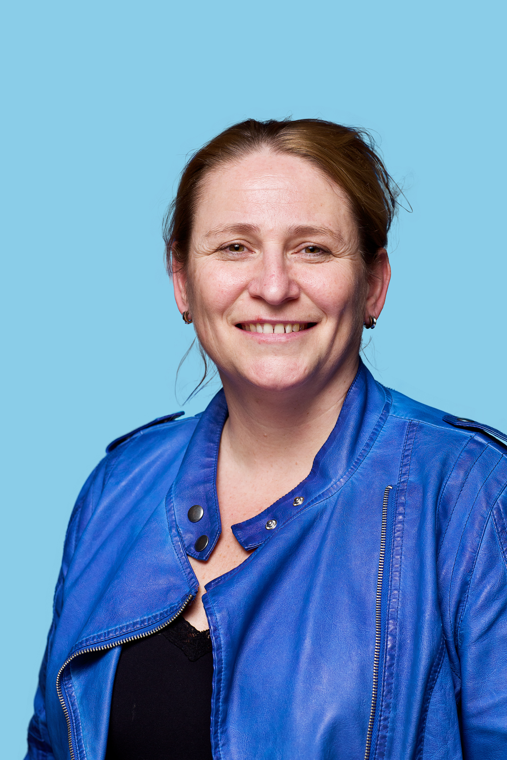 18 januari 2015. Kandidaat voor de Eerste Kamer. Op pvda.nl de volledige kandidatenlijst: bit.ly/1zpNRIG. Foto Lex Draijer.